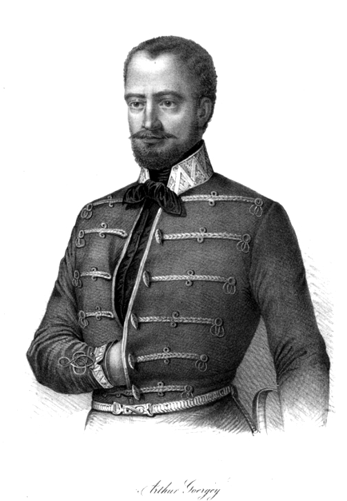 Görgey von Görgö und Toporcz, Arthur